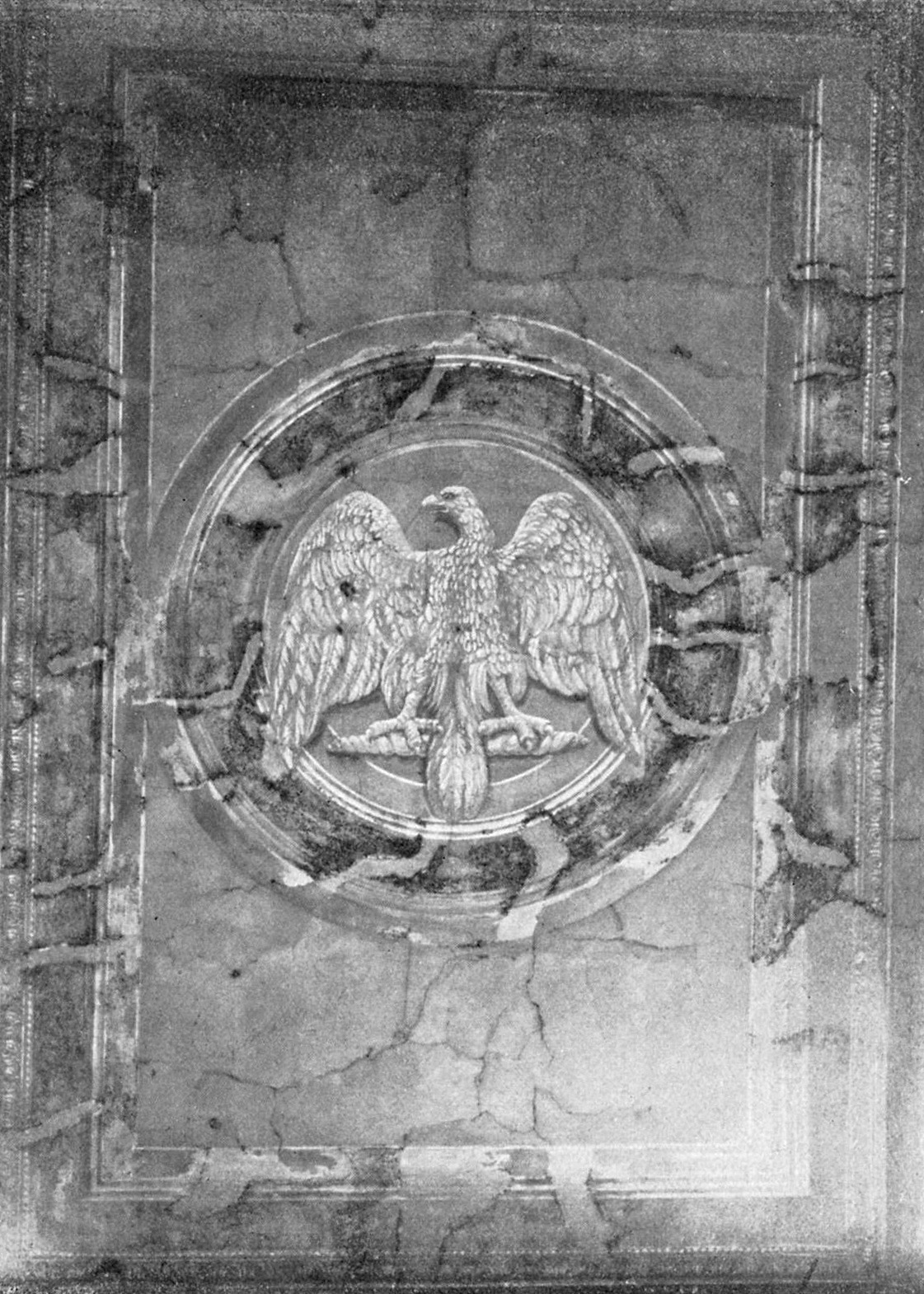 Deckenmalerei in der mitteleren Durchfahrt des Brandenburger Tores (Berlin) im Zustand kurz vor der Beseitigung 1926. Diese Deckenmalerei wurde dort 1841 angebracht, 1875 erneuert und 1926/27 entfernt.